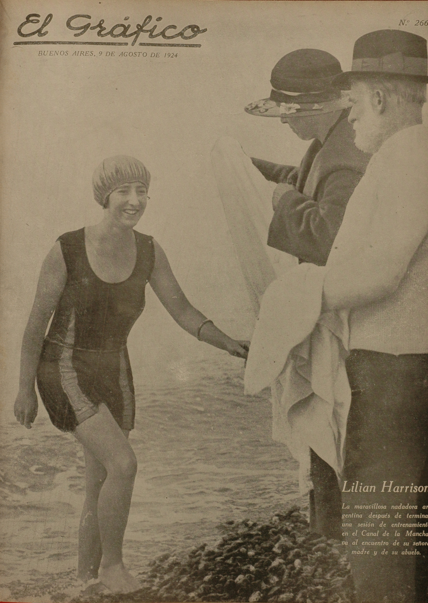 El Grafico del 09 de Agosto de 1924. Edicion 266